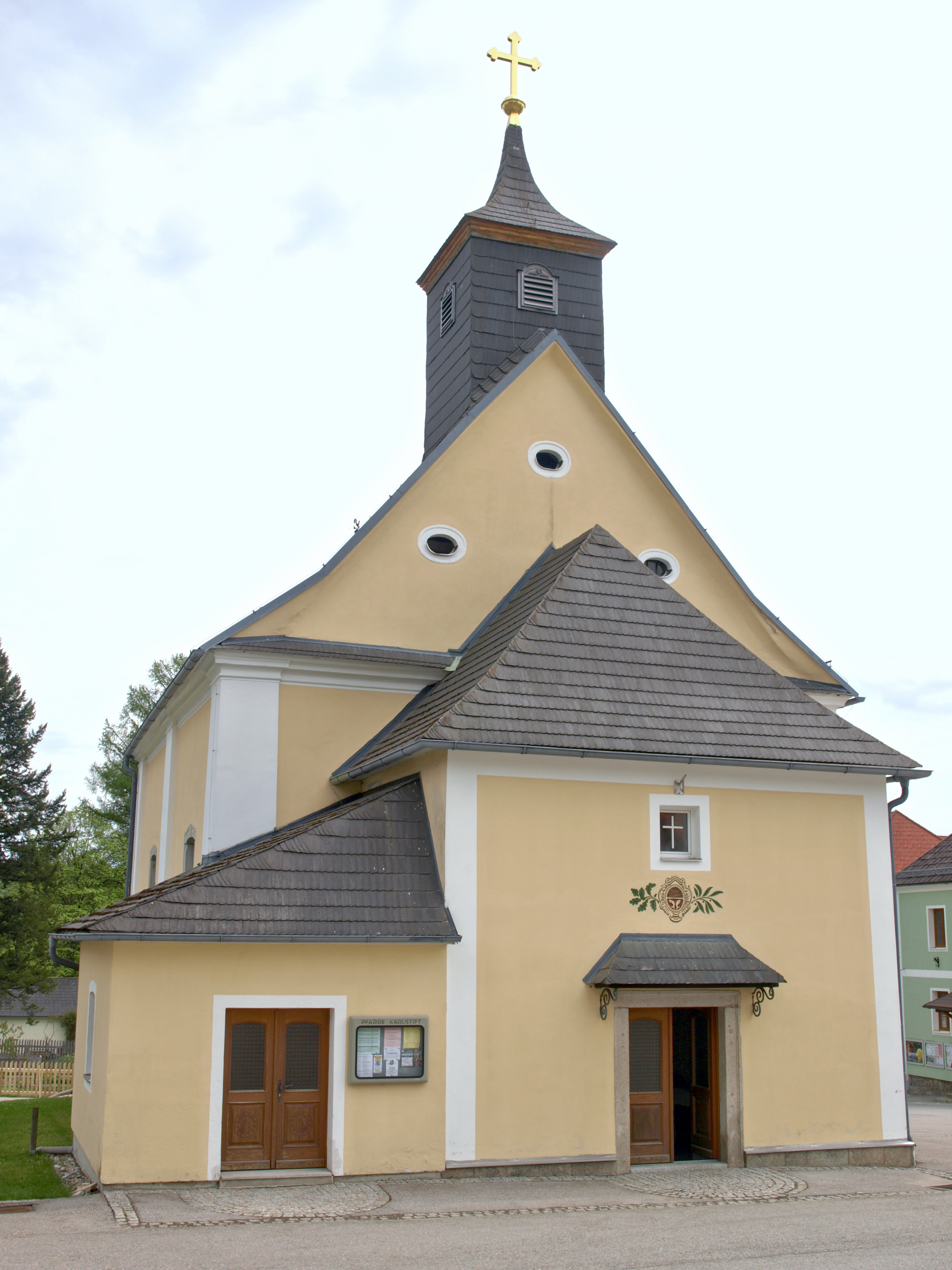 Kath. Pfarrkirche hl. Karl Borromäus